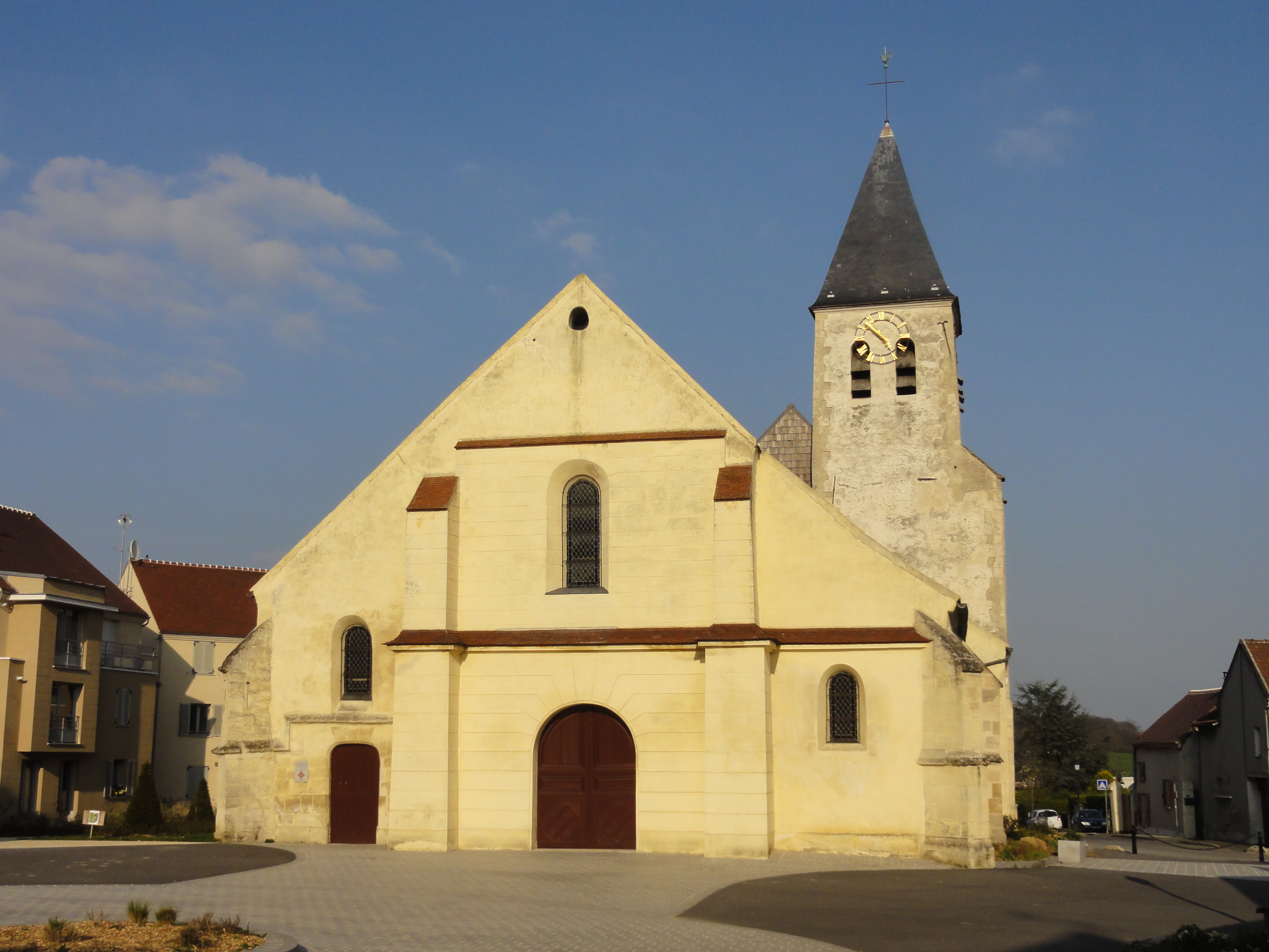 Façade occidentale.